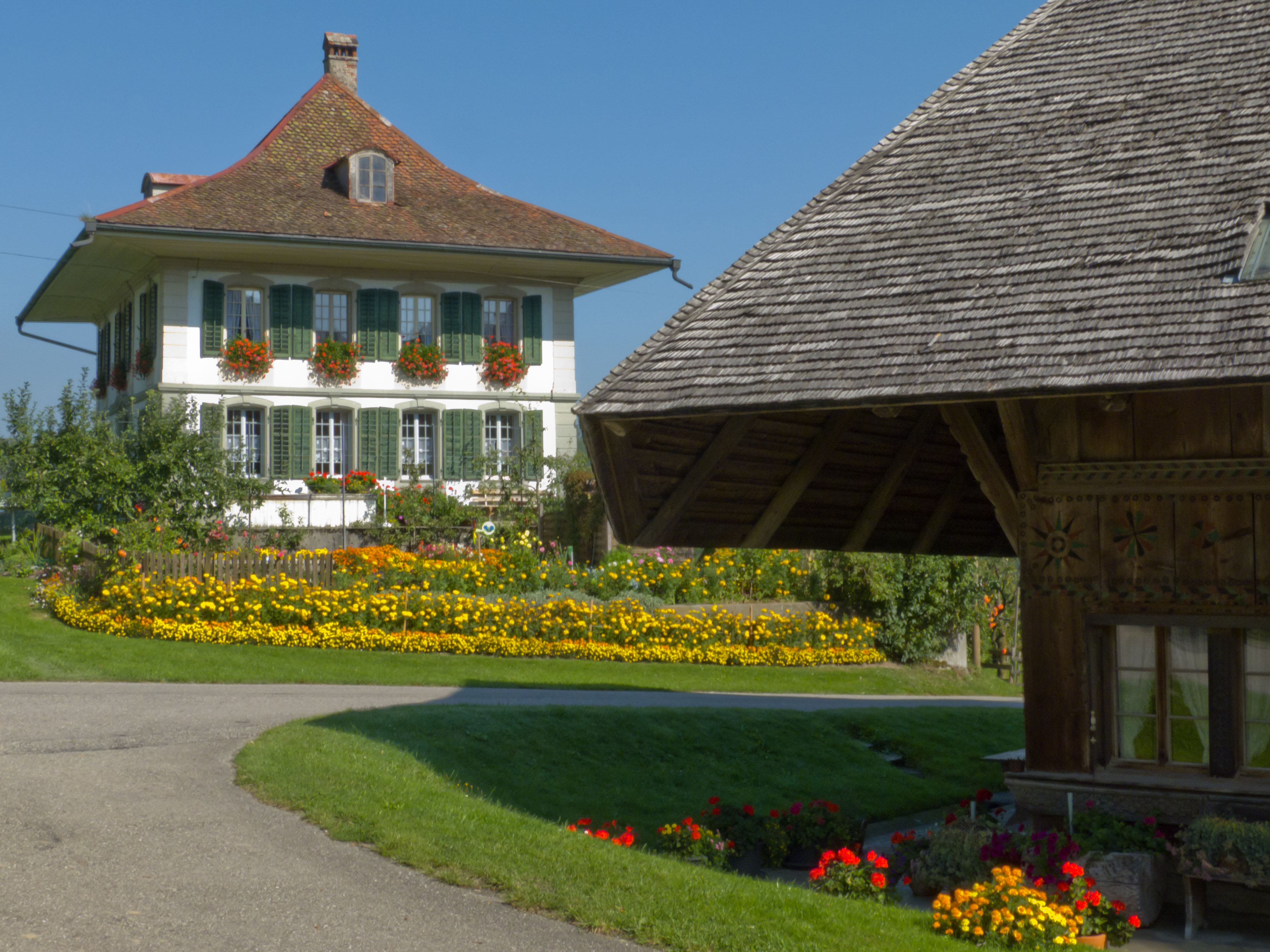 Wynigen, "Glungge" mit Herrenhaus